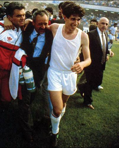 Demetrio Albertini, con il massaggiatore del Milan e il dirigente Adriano Galliani (sullo sfondo), festeggia lo scudetto rossonero della stagione 1991-1992. Licensing 1991-1992 1991-1992